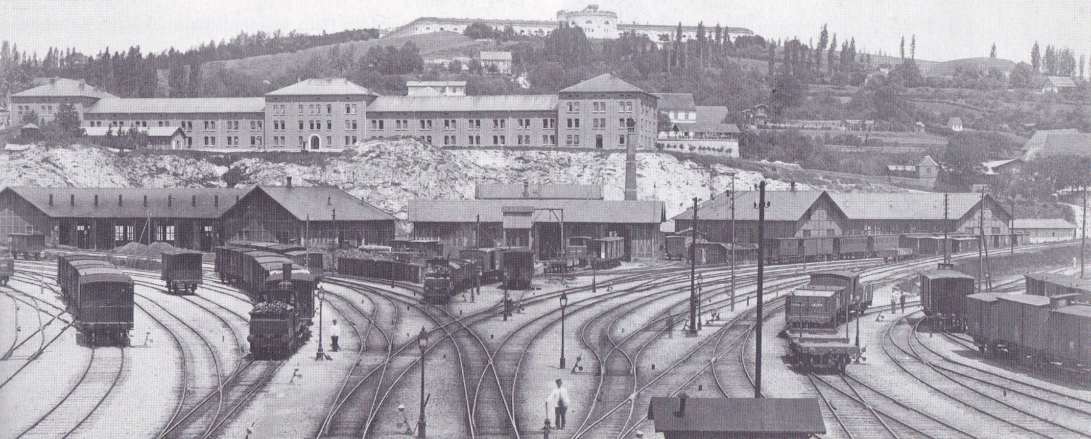 Panorama des Bw Ulm Hbf um 1877; von links nach rechts: Ringlokschuppen 1, Rechteckschuppen (später Ellokschuppen), Ringlokschuppen 2; im Vordergrund links die Donautalbahn nach Sigmaringen, rechts die Filstalbahn nach Stuttgart und die Brenzbahn nach Aalen; im Hintergrund die Kienlesbergkaserne